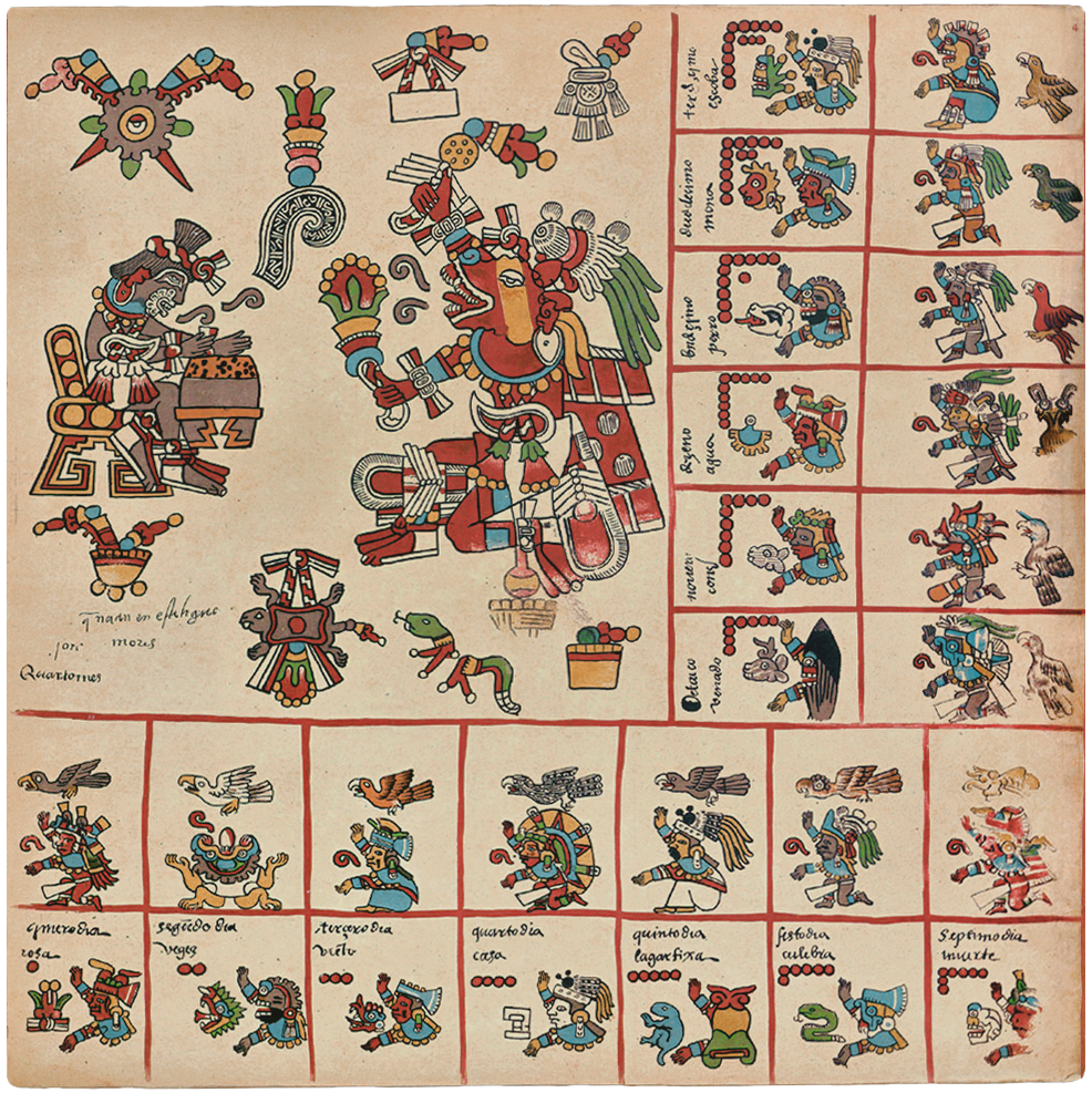 Planche 04 du codex Borbonicus. Étalonnage des couleurs en correspondance avec l'oeuvre originale.